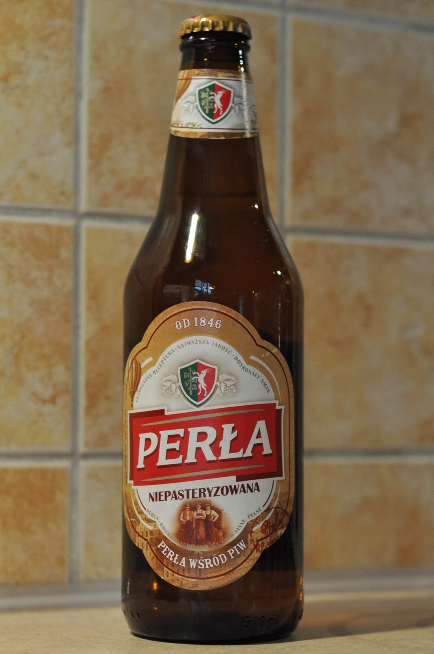 Perła, piwo niepasteryzowane. Browary Lubelskie S.A. 0,5l